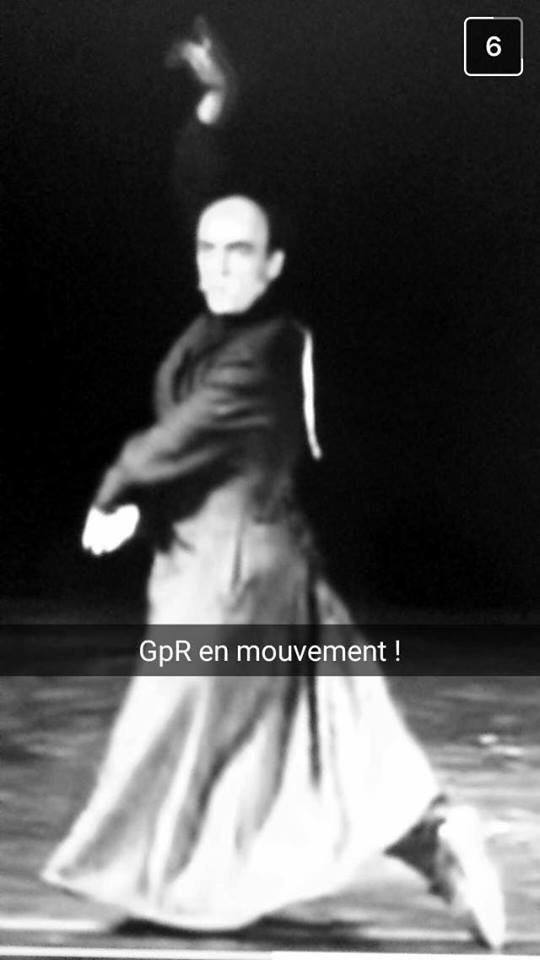 Elie kakou, grand admirateur du GPR